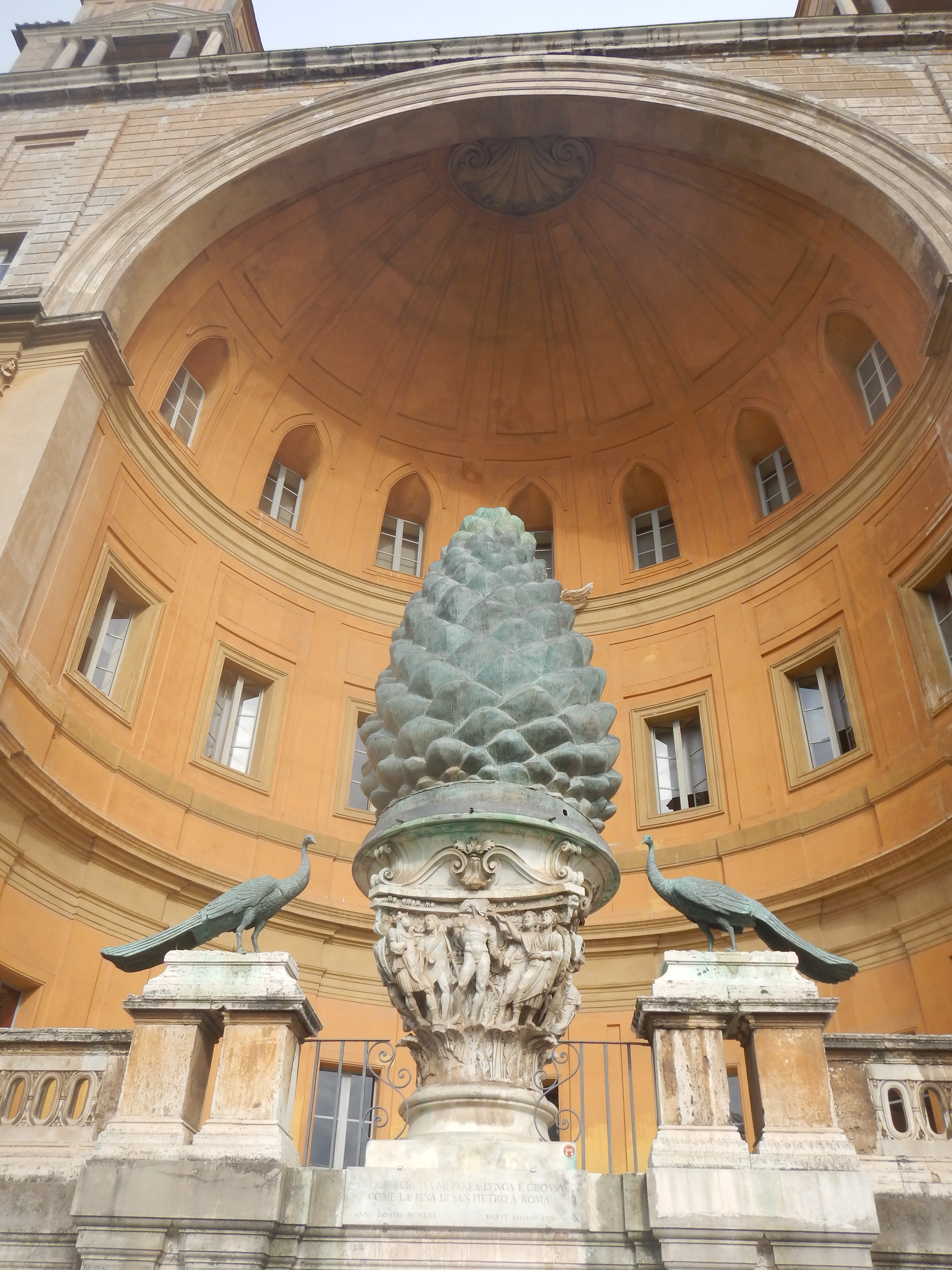 Roma